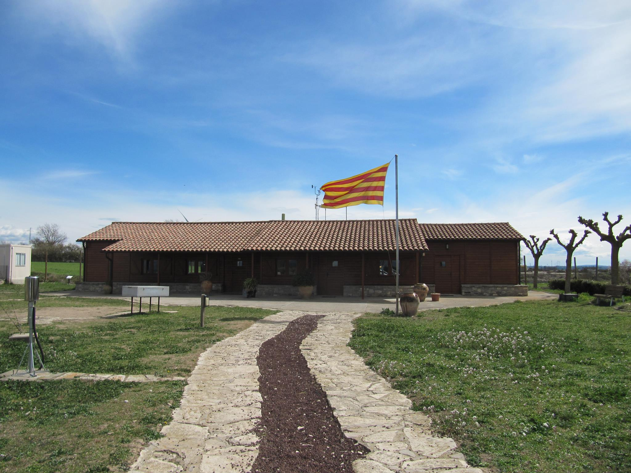 Imatge de l'Observatori de Pujalt